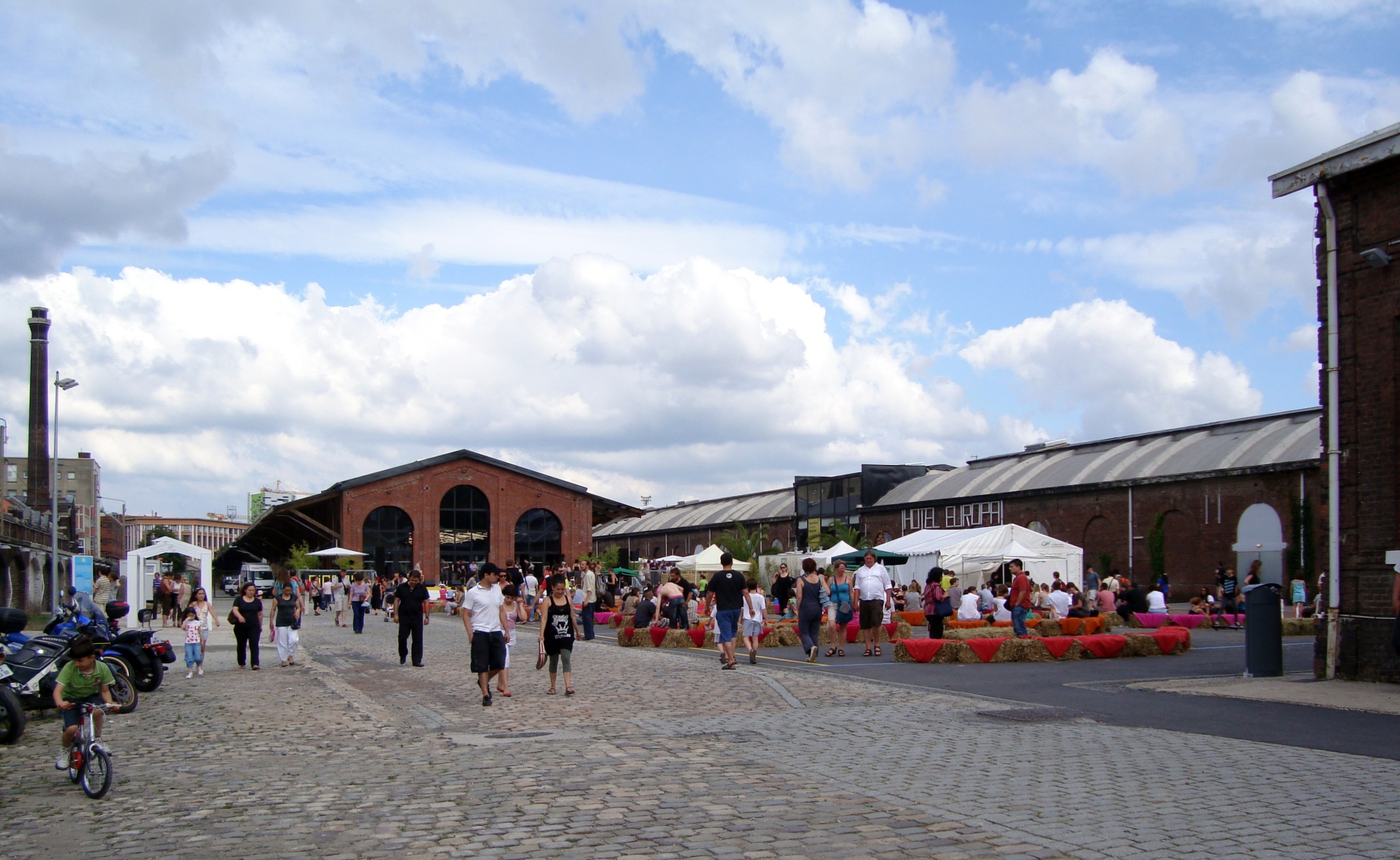 La gare Saint-Sauveur à Lille (Nord).